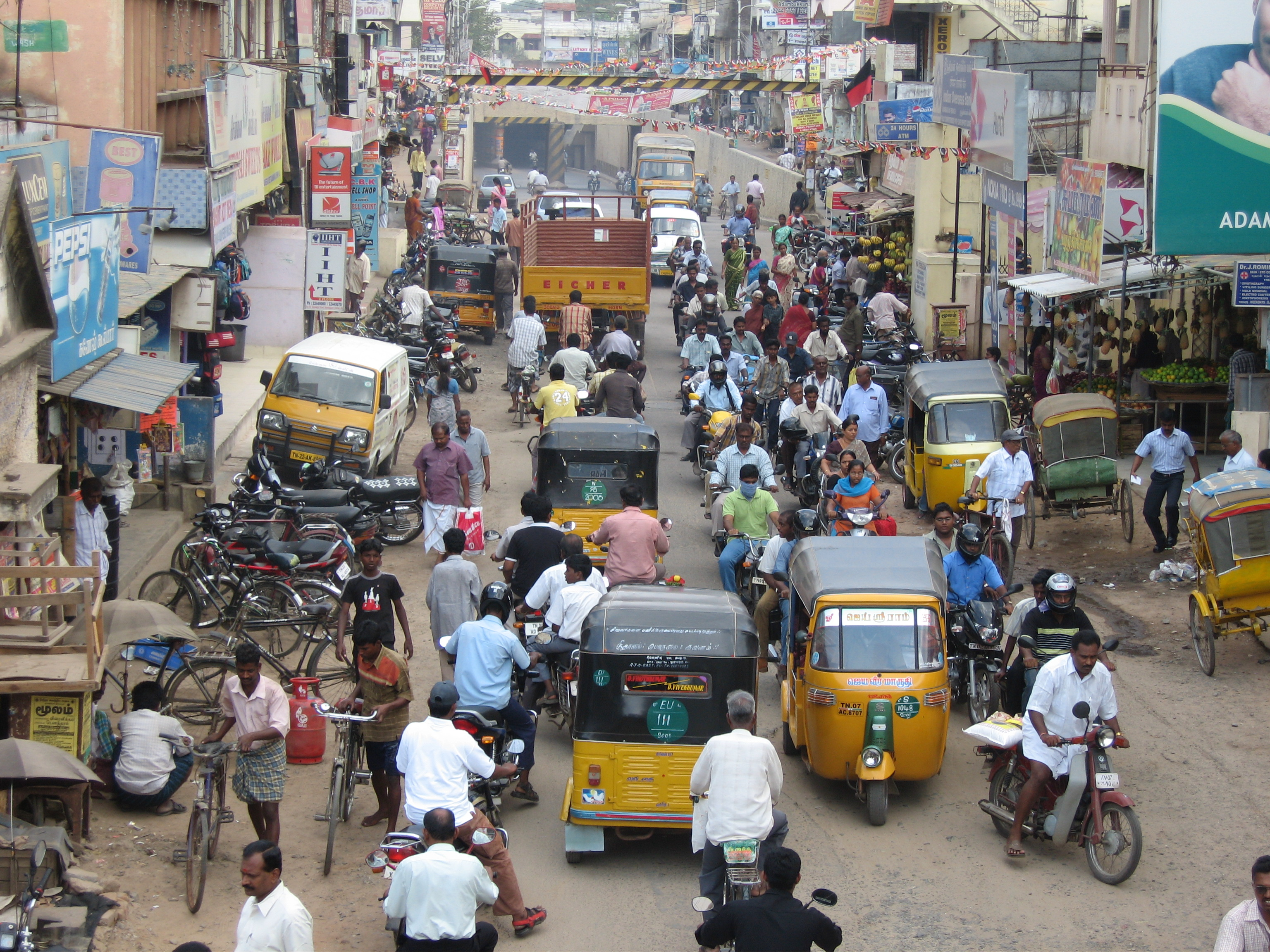 Picture taken at Adambakkam, India.